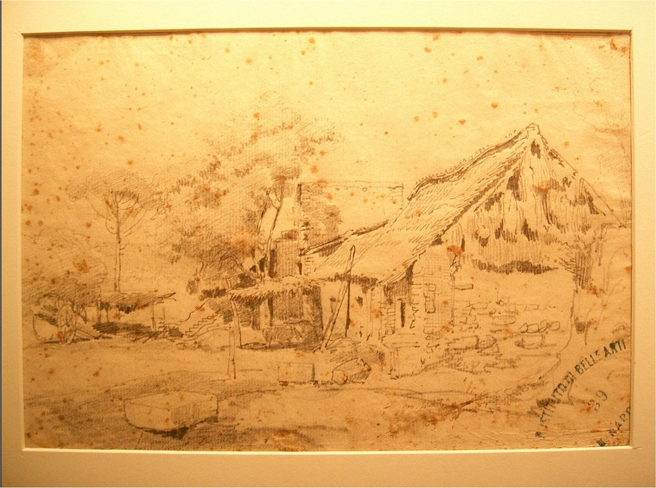 Disegno